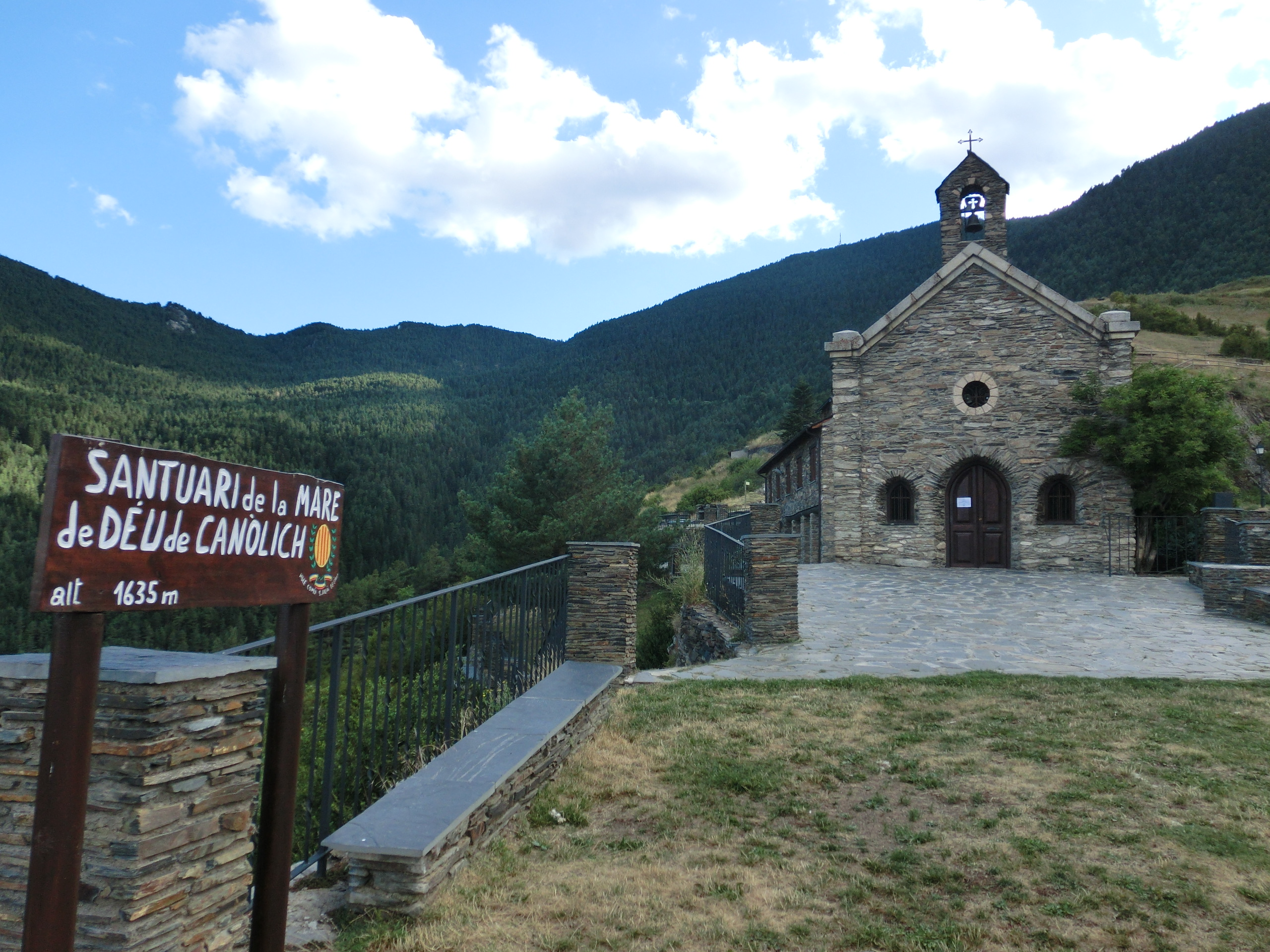 Santuari de la Mare de Déu de Canòlich (o de Canòlic) (Sant Julià de Lòria, Andorra)